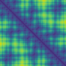 Mapa de calor que mostra la distància entre tots els parells de valors de d a una corba de Hilbert d'ordre 4